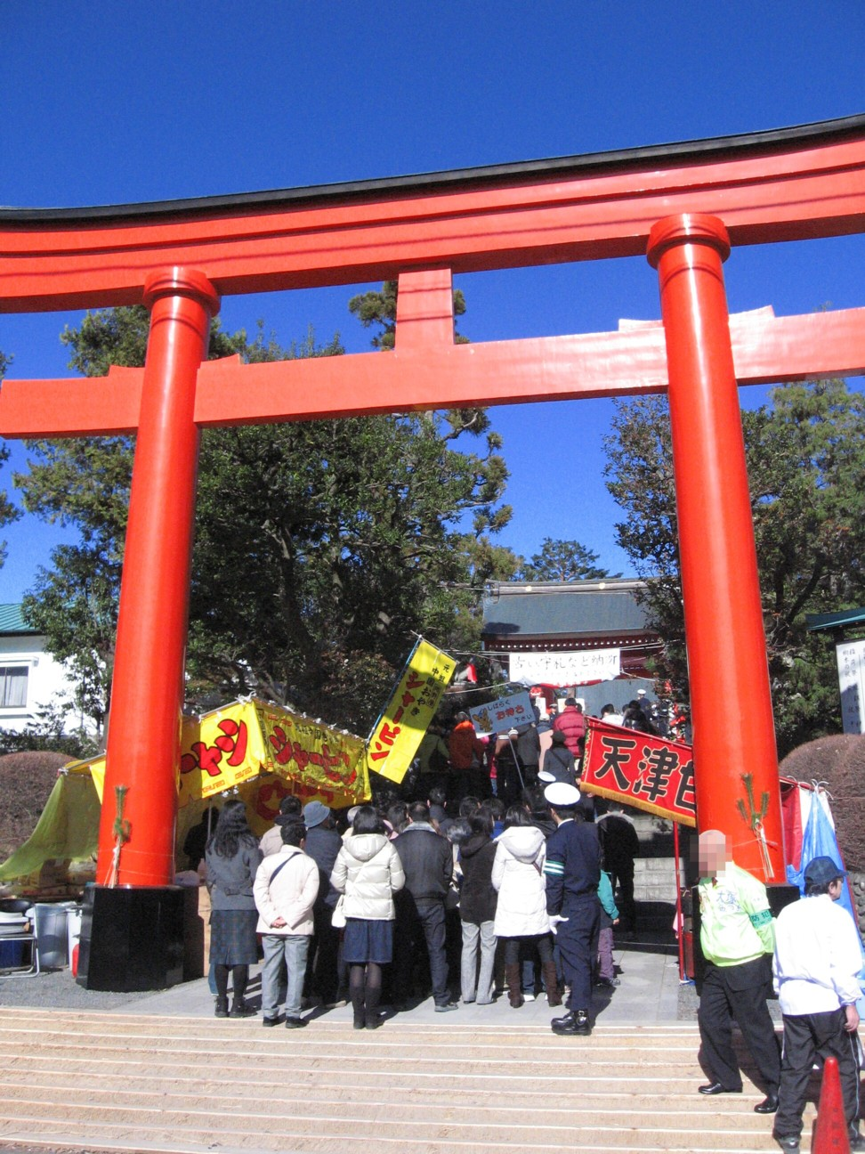 東伏見稲荷神社の初詣風景（2010年1月）